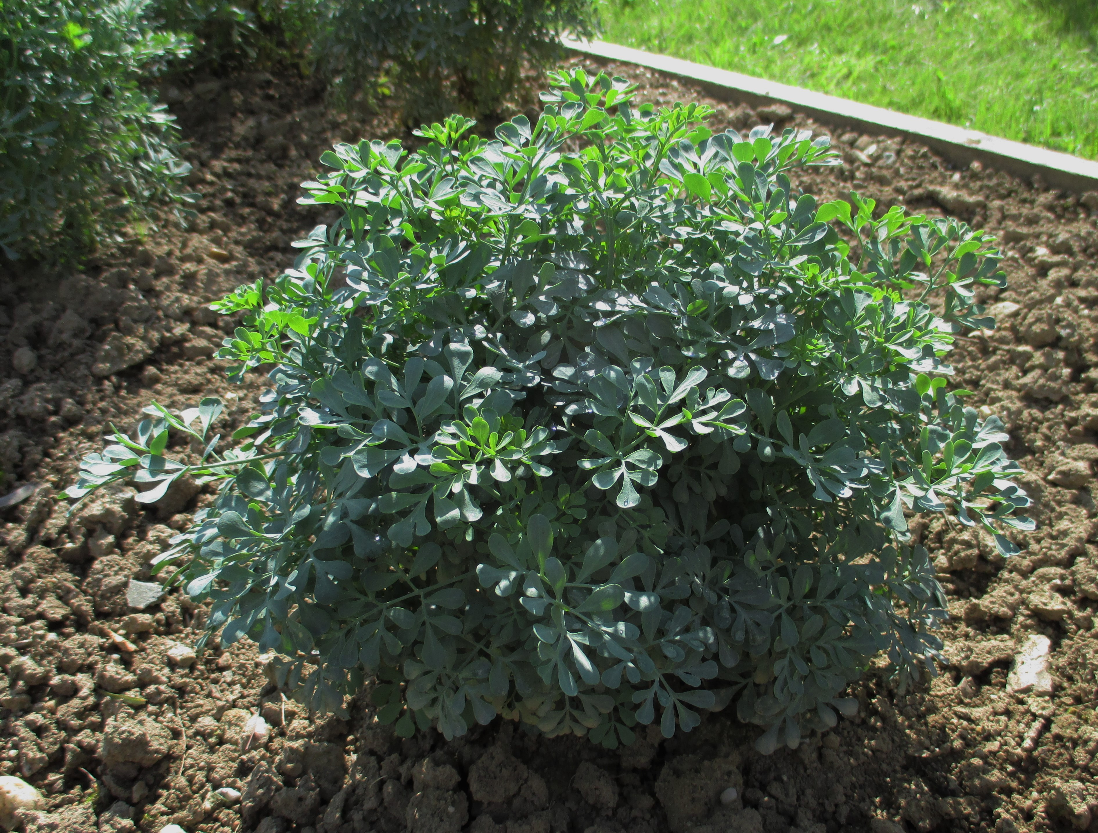 Als unentbehrliche Heilpflanze durfte die Weinraute in den Klöstern des Mittelalters nicht fehlen. Sie wirkt krampflösend, durchblutungsfördernd und lindert die Beschwerden in den Wechseljahren.